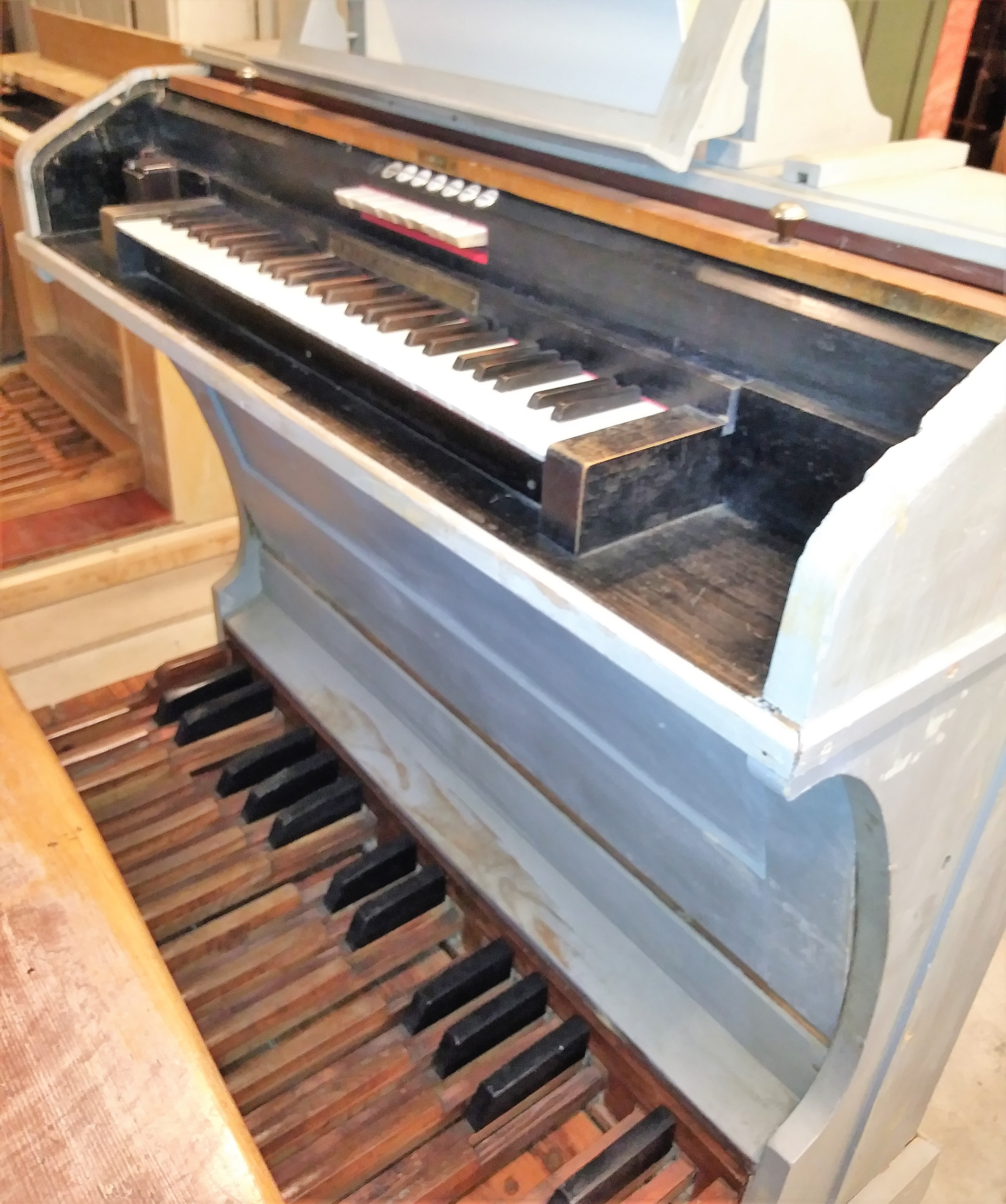 Orgel- und Spieltischsammlung im Untergeschoss der Zollingerhalle (Orgelzentrum Valley)